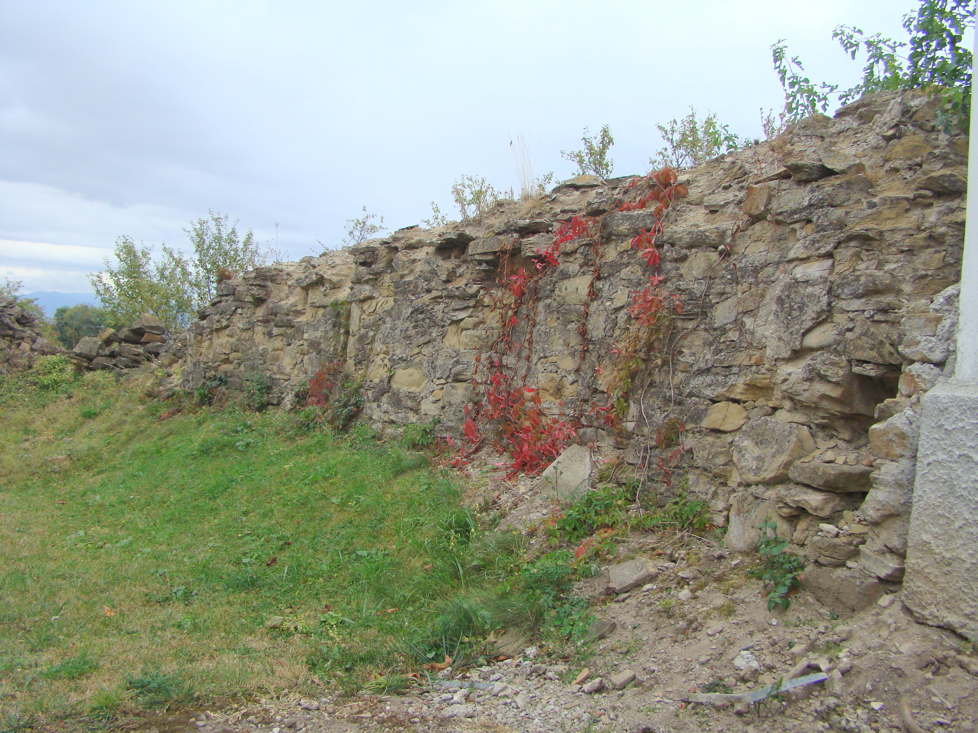 Zid de incintă, cu turn-clopotniță, sat Albiș; comuna Cernat 158 sec. XV - XVI, turn ref. 1637, transf. sec. XIX 02